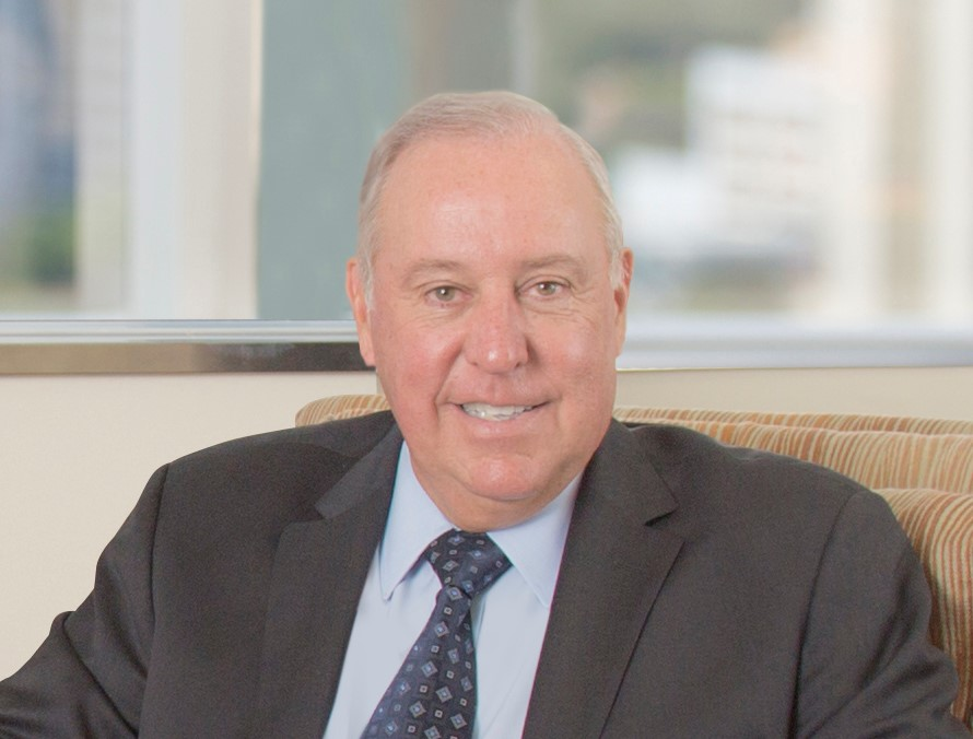 Alberto Vallarino, CEO Grupo Verdeazul, S.A.